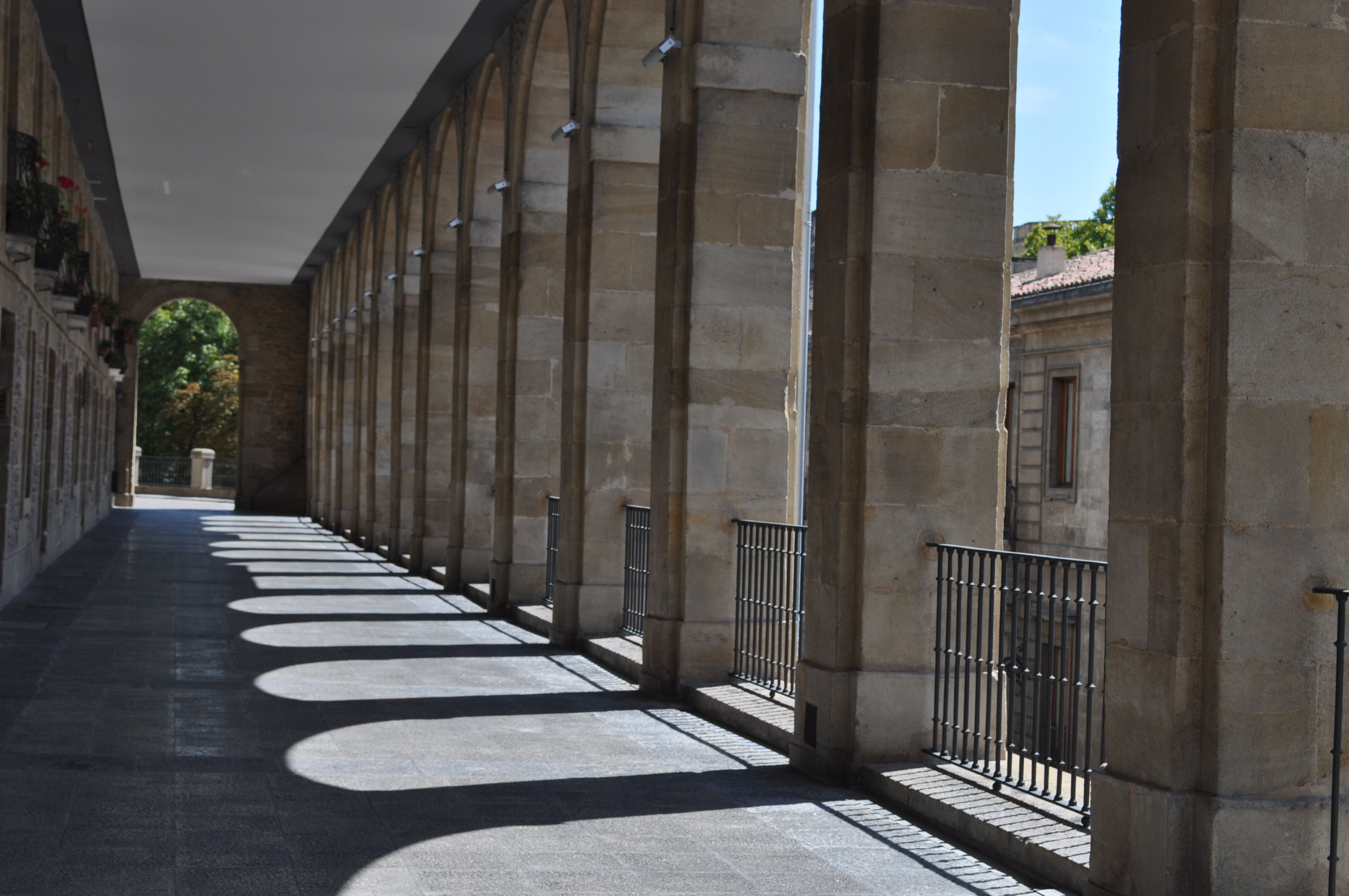 Vista interior